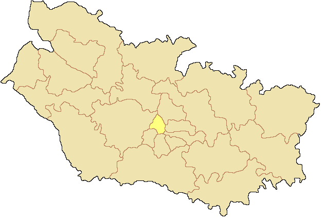 Canton d'Amiens-1 dans le département de la Somme